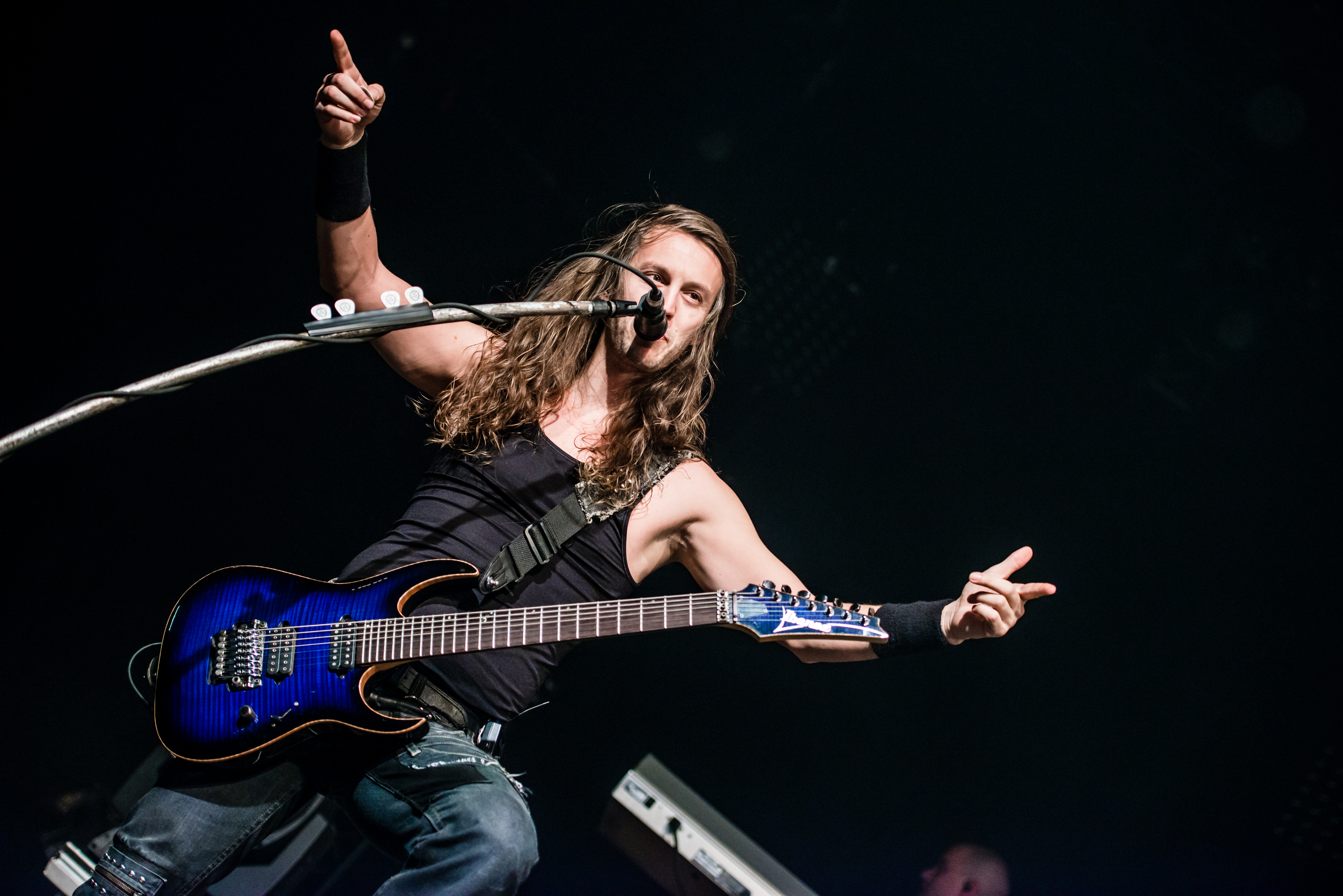 'Epica - Epic Metal Fest - Eindhoven'